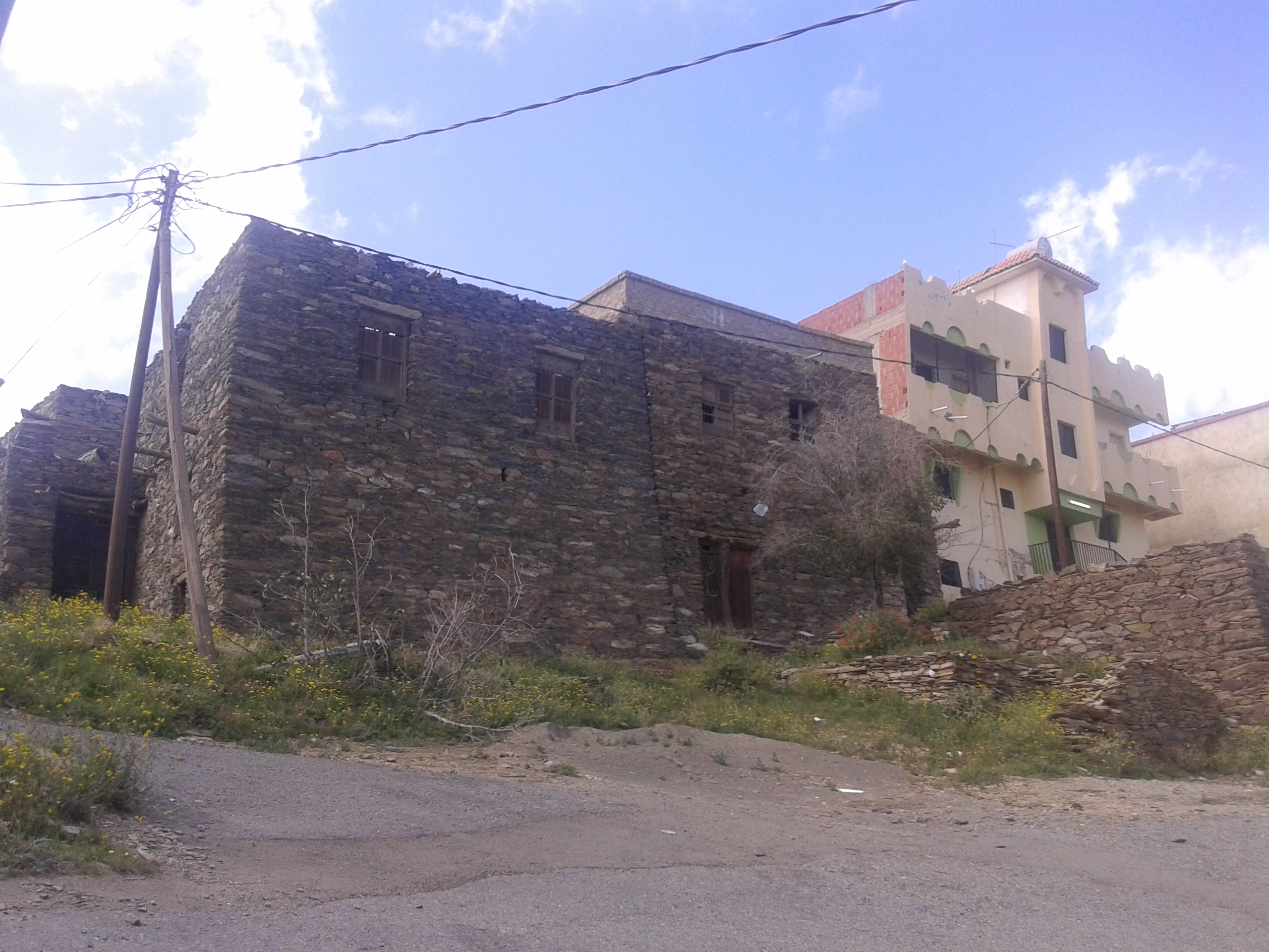 أحد منازل منطقة الباحة الأثرية